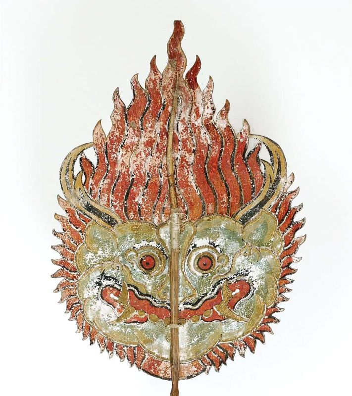 Pop. Wajangfiguur van leer Unknown language: Gunungan